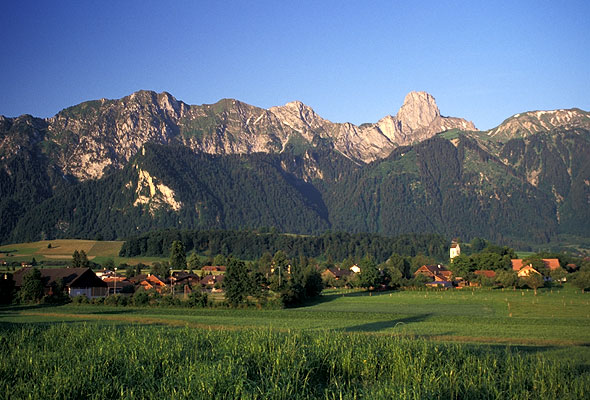 Amsoldingen mit Stockhornkette